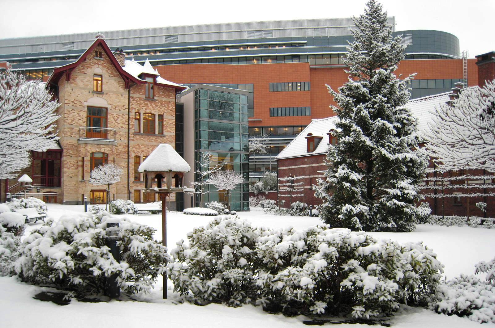 Die Gebäude "Villa" und "Marstall" der Vertretung des Freistaates Bayern bei der EU in Brüssel, in Dezember 2010.